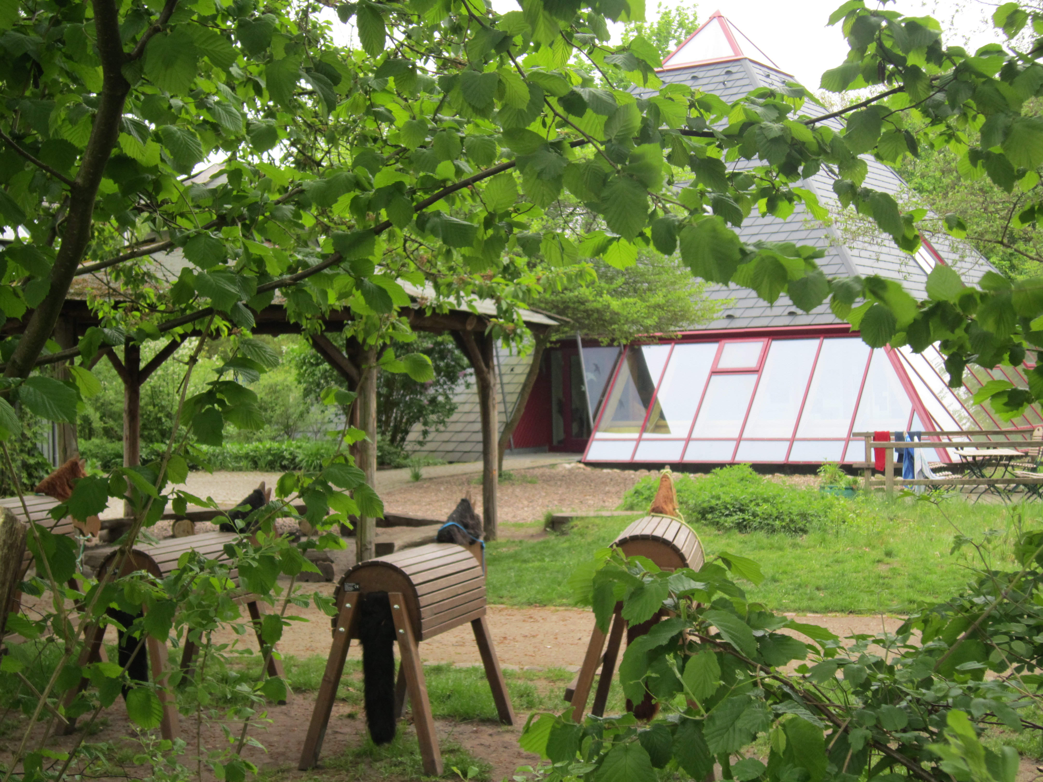 Seitenansicht der Umweltpyramide des NABU-Umweltbildungszentrums im Natur- und Erlebnispark Bremervörde